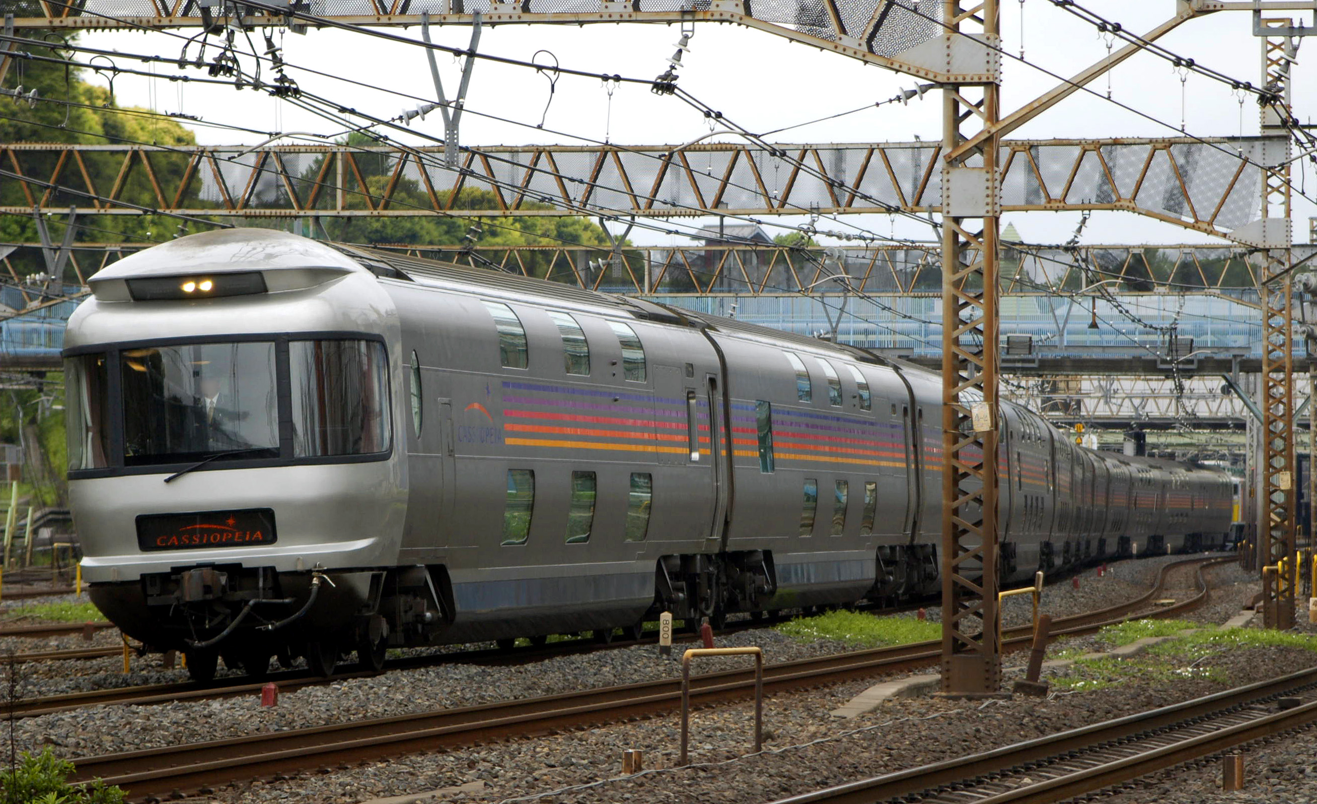 JR East E26 series passenger cars, Limited express "Cassiopeir". JR東日本の「カシオペア」用寝台客車E26系、スロネフE26側。上野―尾久間で推進回送を行うため、客車だがヘッドライトを装備する。尾久―上野(日暮里-鶯谷)間にて。